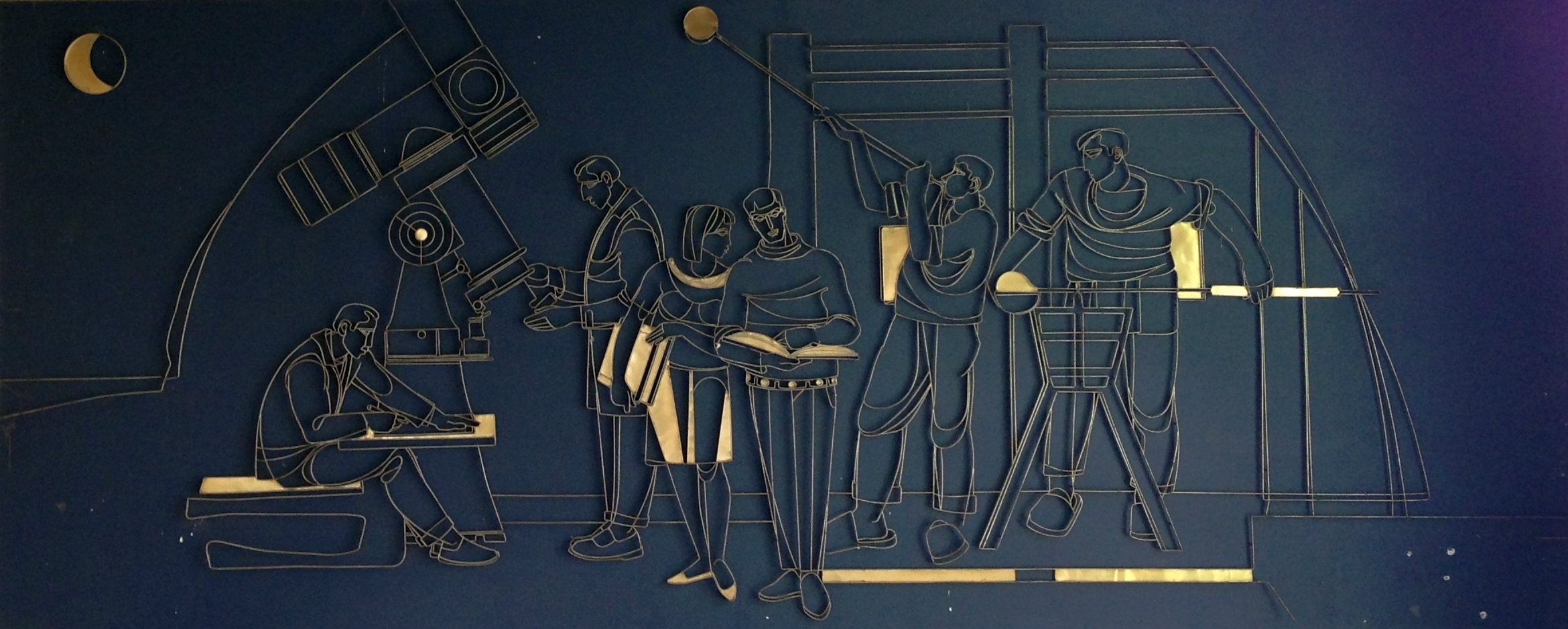 Kulturdenkmal, Wandbild aus Alu-Bändern, erschaffen von Kurt Hanf, zeigt Figuren, welche vormals Bahnreisende in die Kernbereiche der Stadt (Universität, Zeiss und Schott) einführten